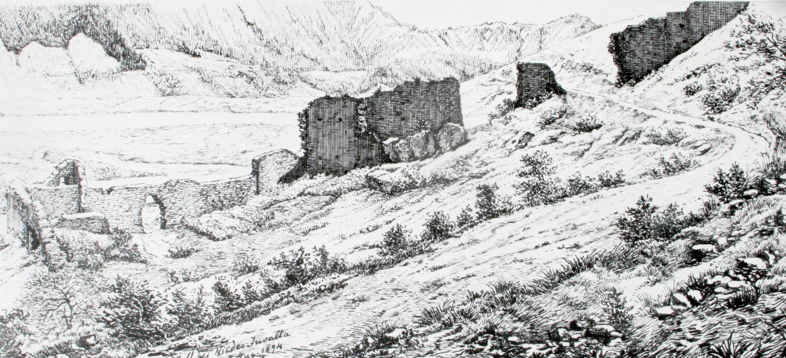 Ringmauer der Unterburg von Burg Hochjuvalt um 1894, Zeichnung von J. R. Rahn